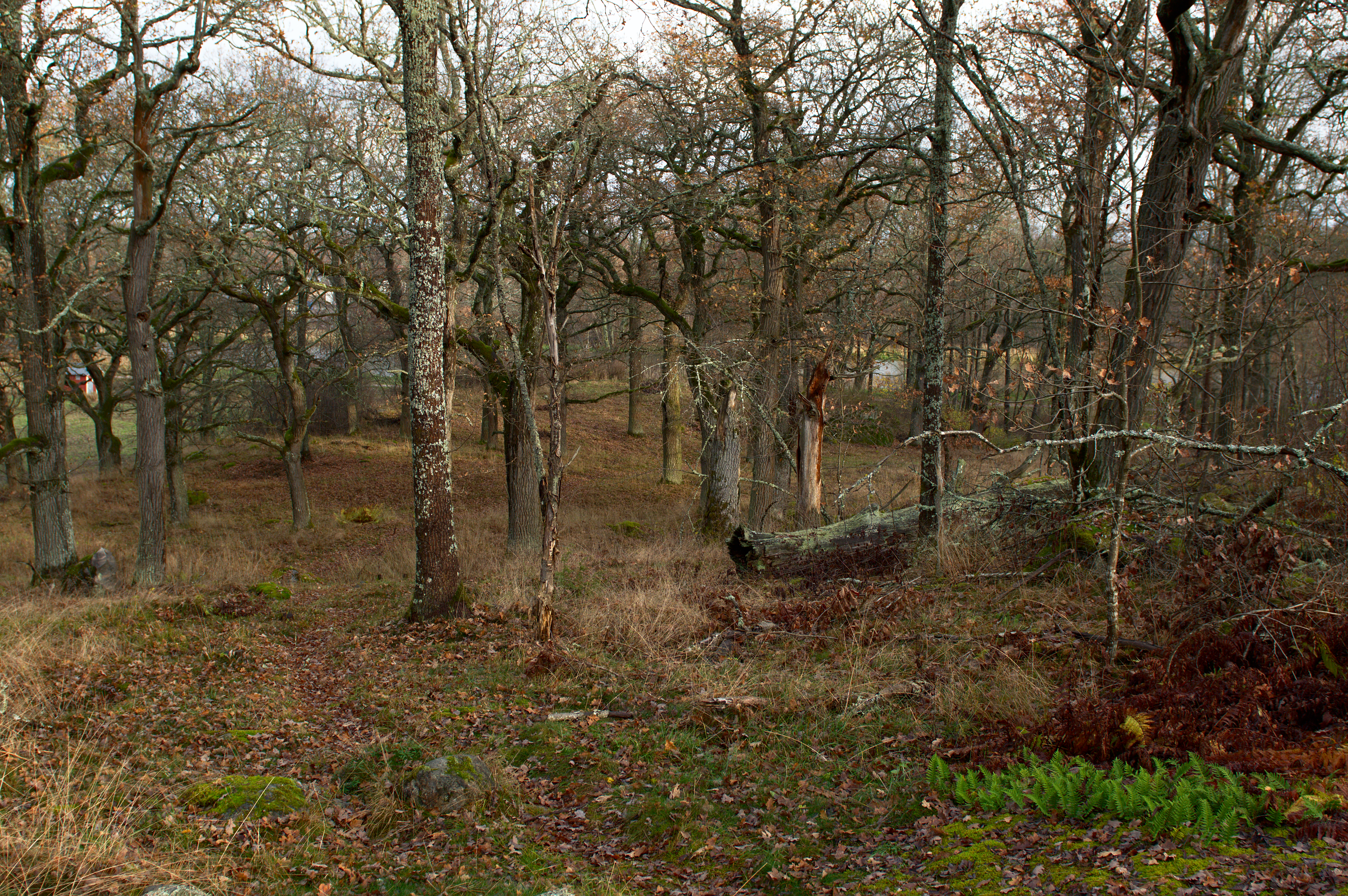 Ekbackens naturreservat i Eskilstuna. Ekar i reservatet.